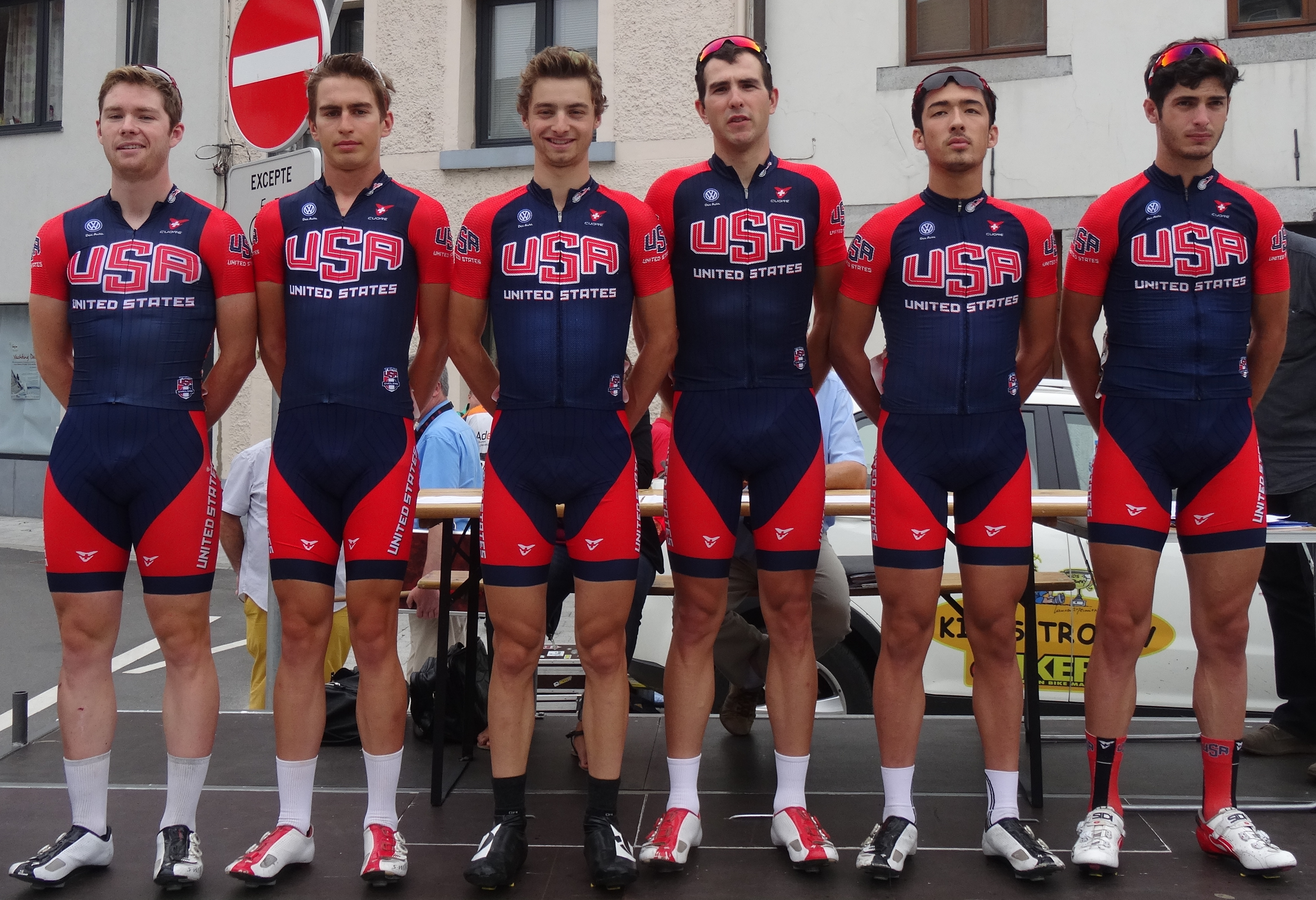 Reportage photographique réalisé le mercredi 6 août à l'occasion du départ de la première étape du Tour de la province de Namur 2014 à Jambes (Namur), Belgique.